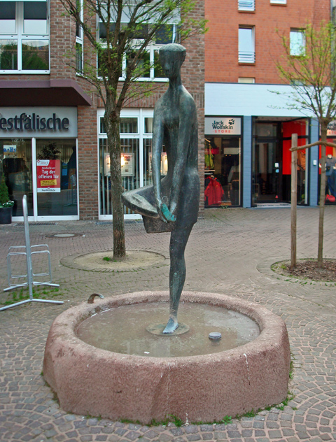 "Die Fußwaschende" in der Spiekergasse in Gütersloh